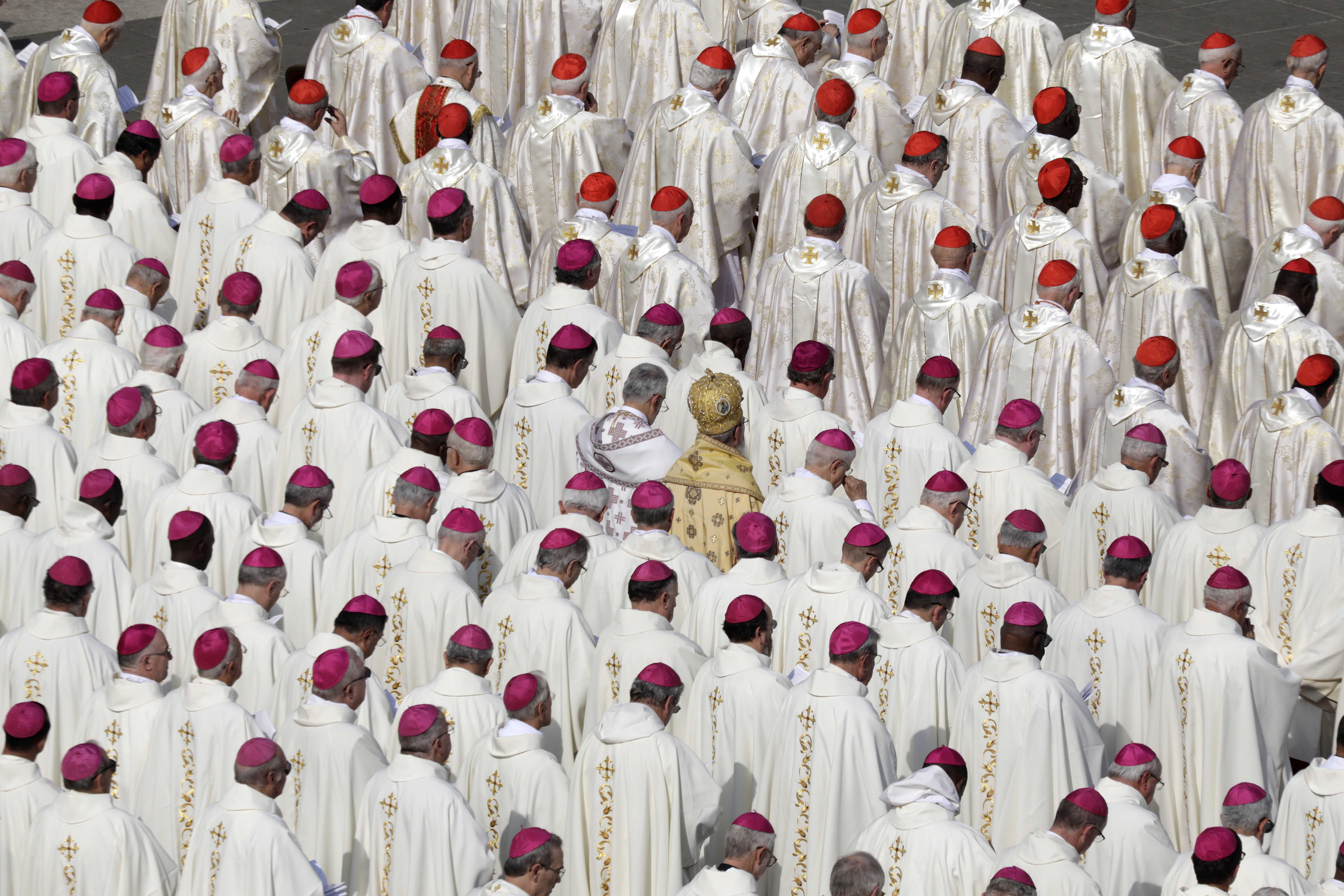 Ceremonia de Canonización de Monseñor Romero.